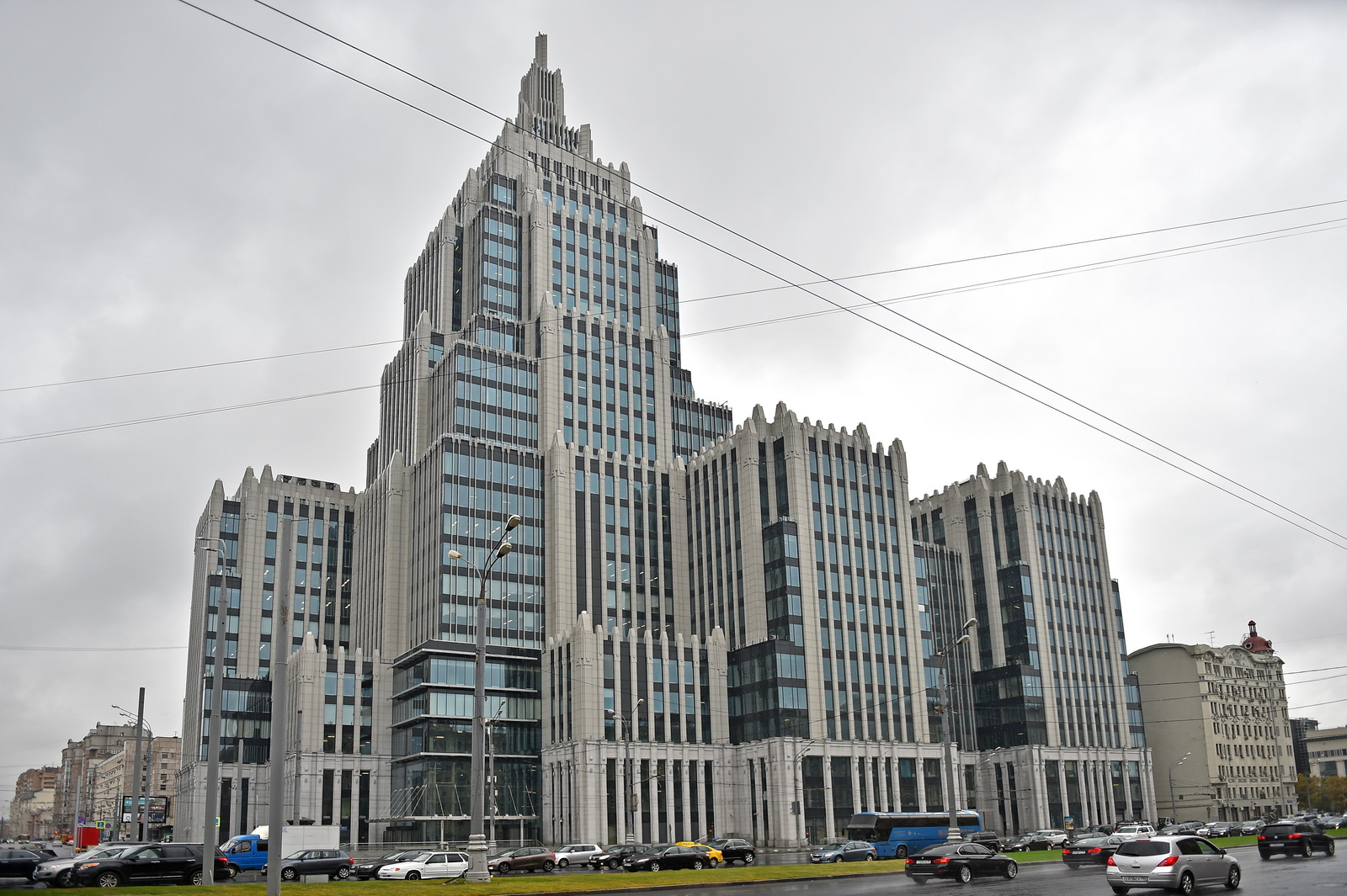 Оружейный (бизнес-центр)